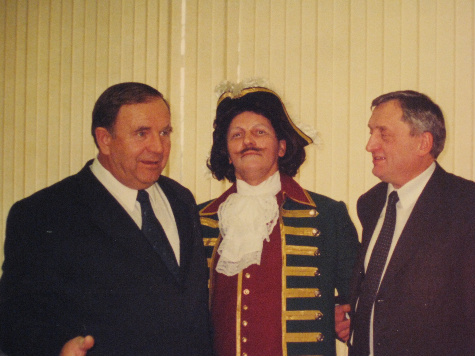 Санкт-Петербургский драматический театр "Патриот" РОСТО (ДОСААФ) на гастролях в Москве в ЦС РОСТО (ДОСААФ): Анохин А.И., Егоров Г.С., Ирзак В.В